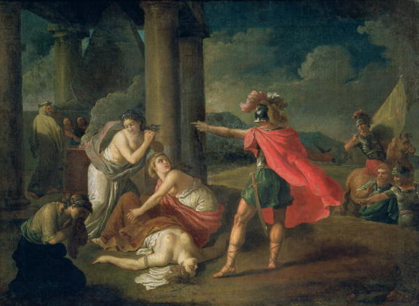 The Death of Camilla, Sister of Horatius, 1787 М. И. Пучинов "Смерть Камиллы, сестры Горация"